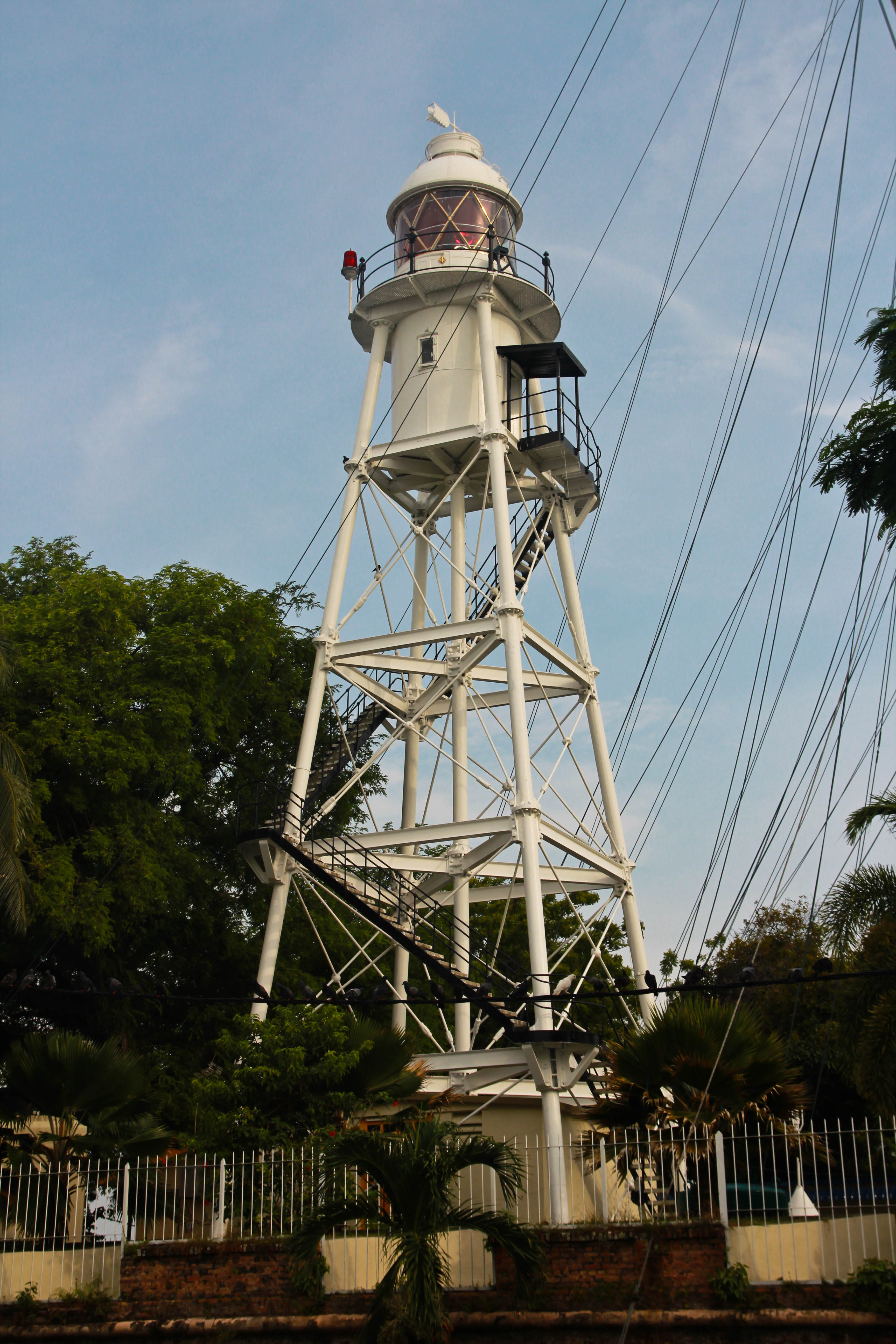 Leuchtturm in Georgetown